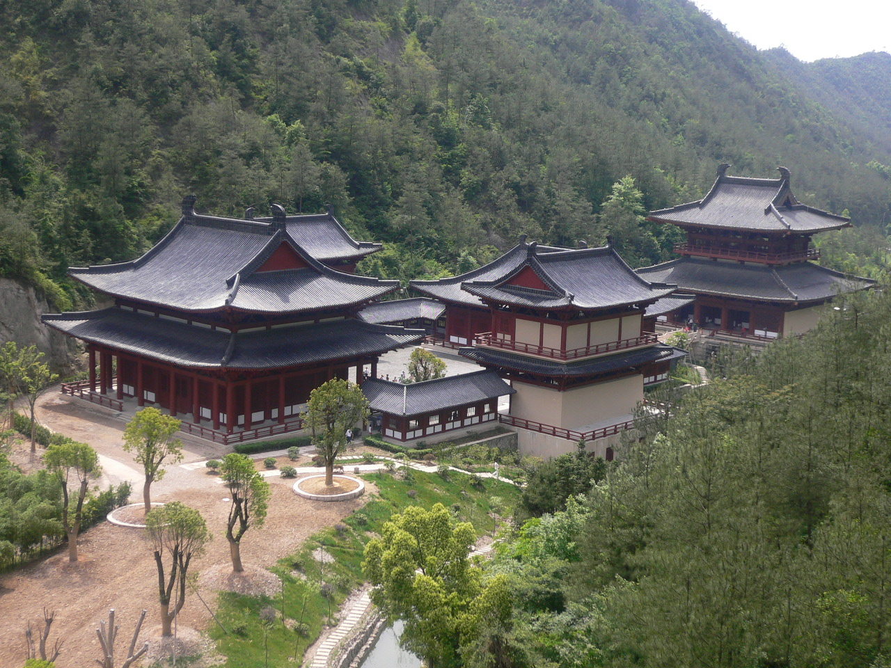 仙都美景黄帝陵1